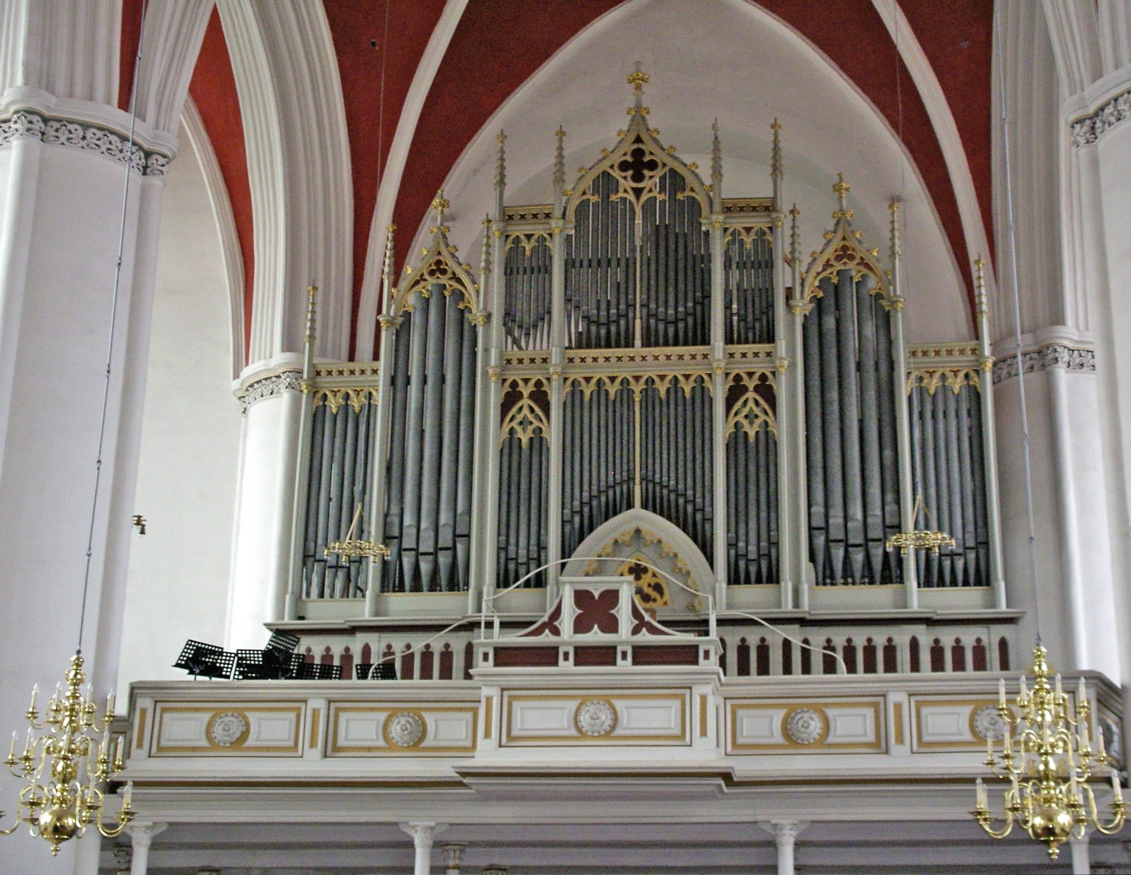 Orgel im Verdener Dom